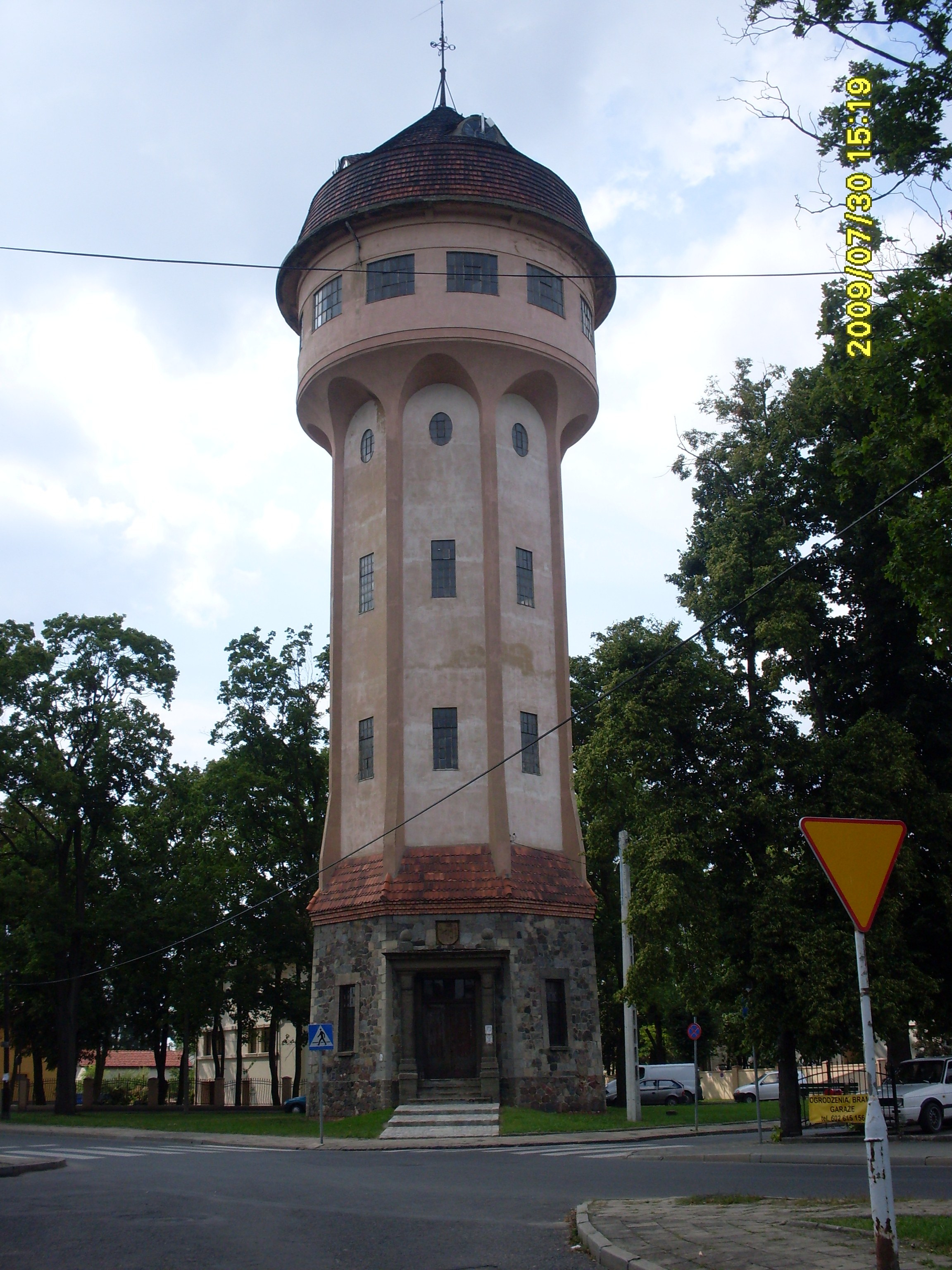 Wieza cisnien w Górze wypudowana w 1912r